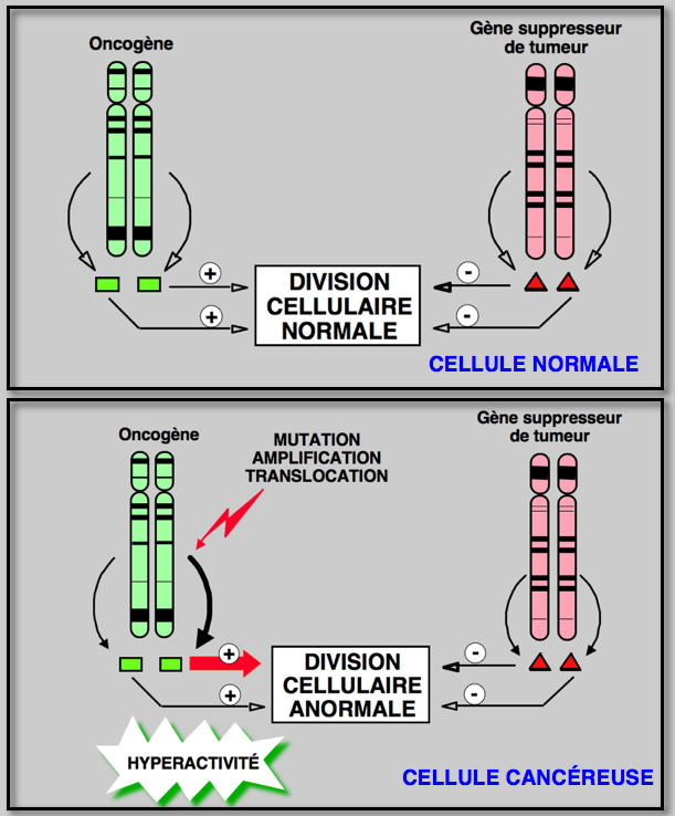 oncogène